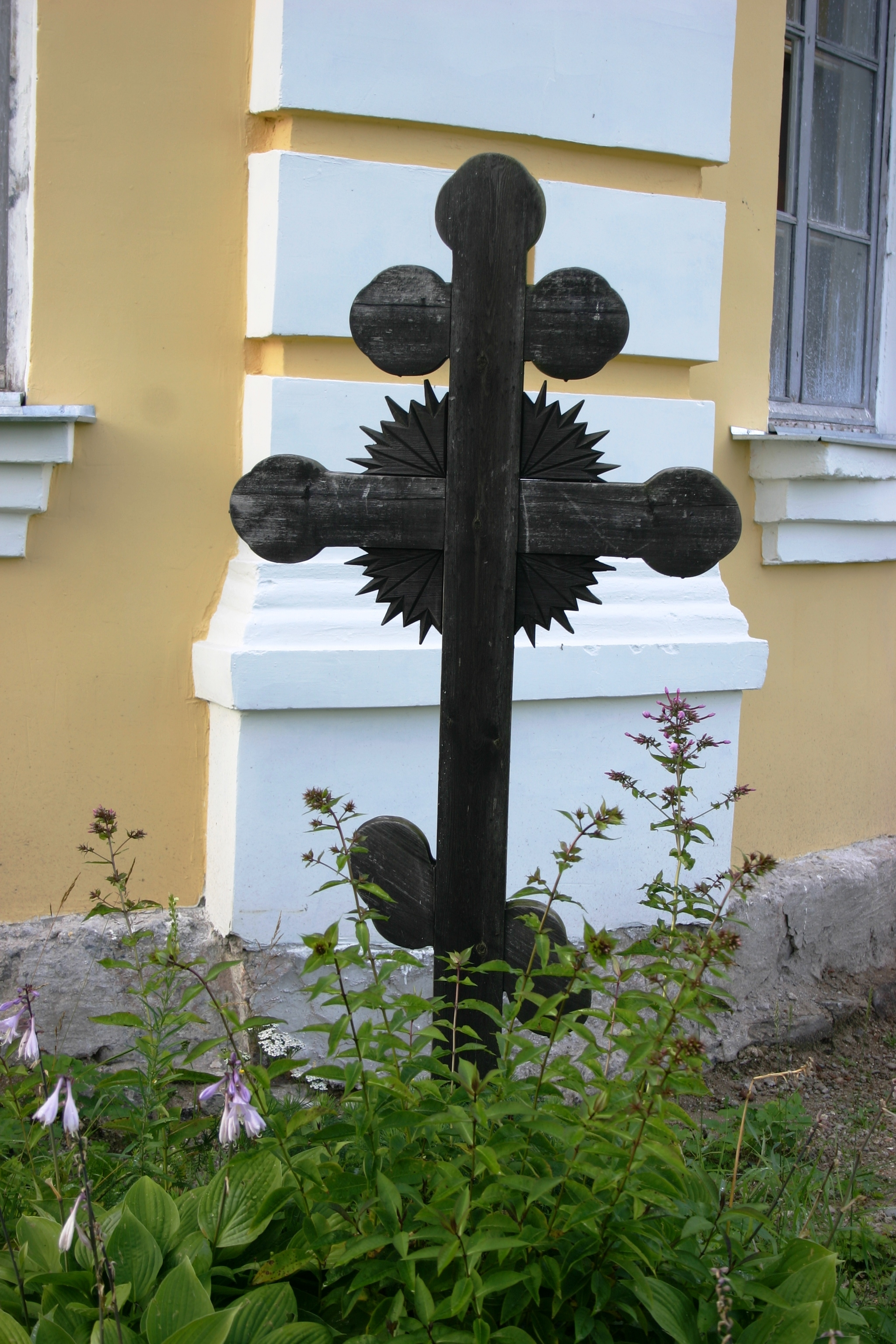 Igumeni Mavrikin hauta Konevitsan luostarissa